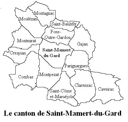 Le canton de Saint-Mamert du Gard Image personnelle